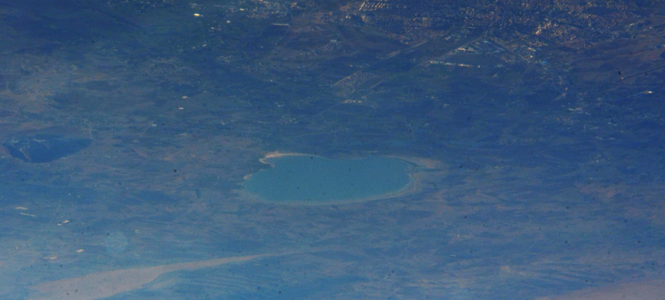 La Sebkha de Bazer